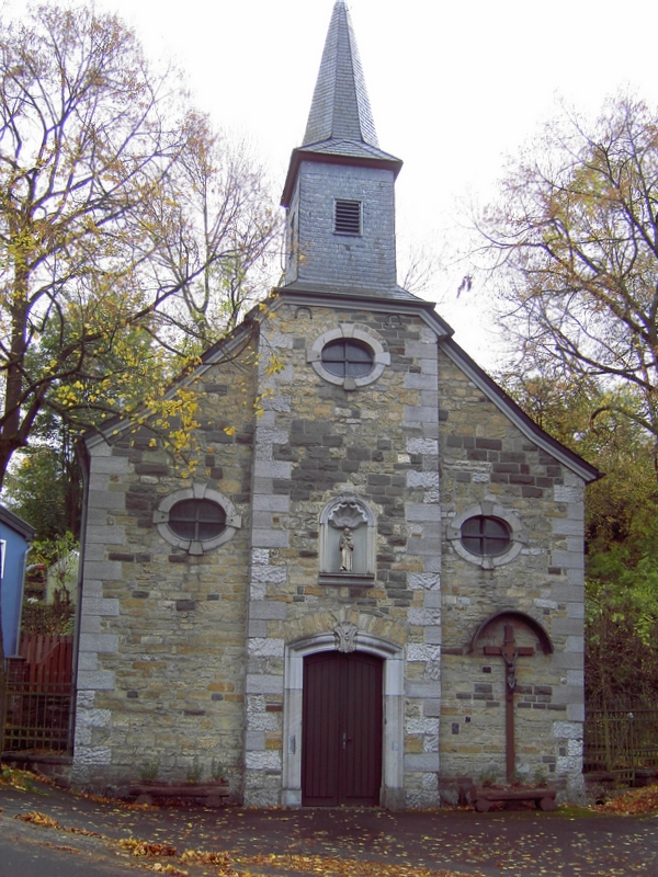 Antoniuskapelle in Kornelimünster